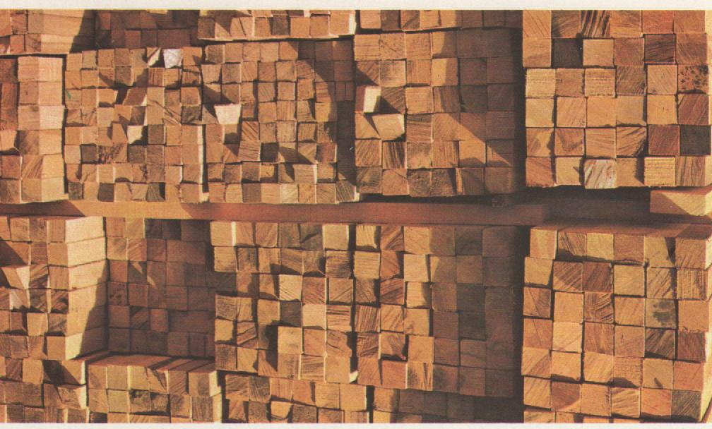 Tirantería en estacionamiento de Diatenopteryx sorbifolia en un aserradero.